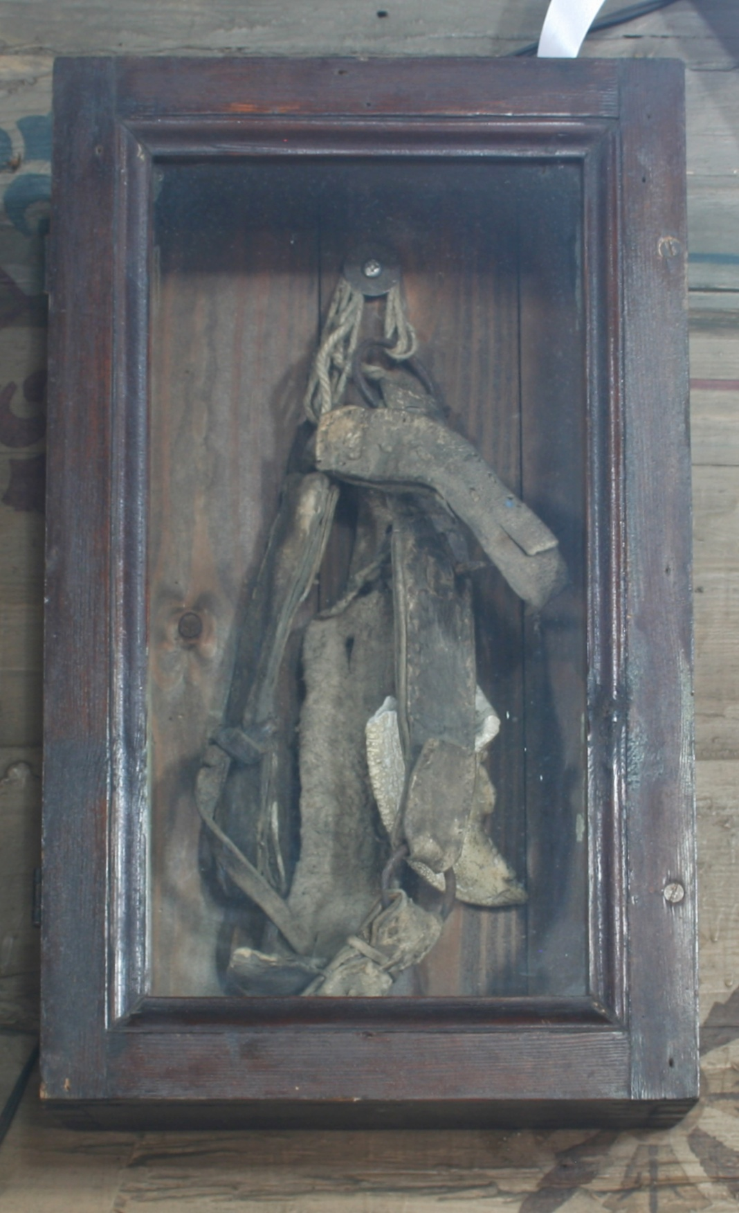 Kościół św. Trójcy w Koszęcinie - "pazur raka"